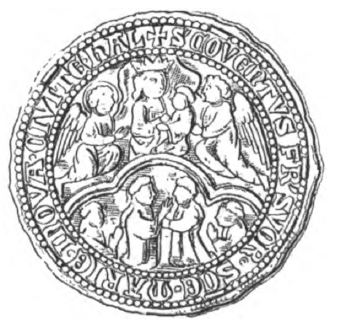 Siegel des Servitenklosters Halberstadt von 1324 (Schmidt, 1879, Taf. 1, Fig. 6